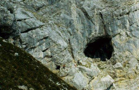 Portal Kolkbläser Monsterhöhle, Steinernes Meer